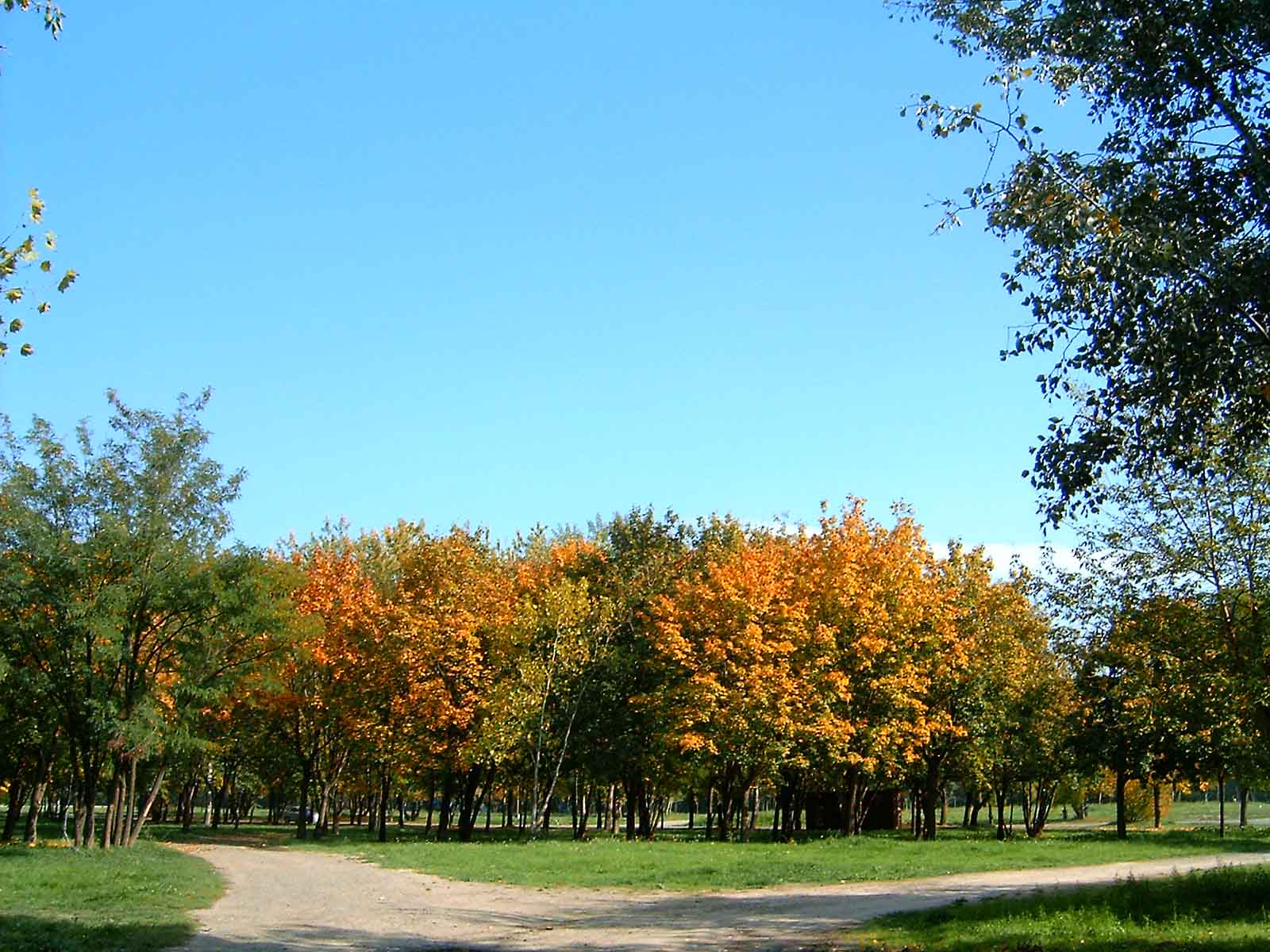 Fák az Óbudai-szigeten, más néven Hajógyári sziget (Budapest, III. kerület)